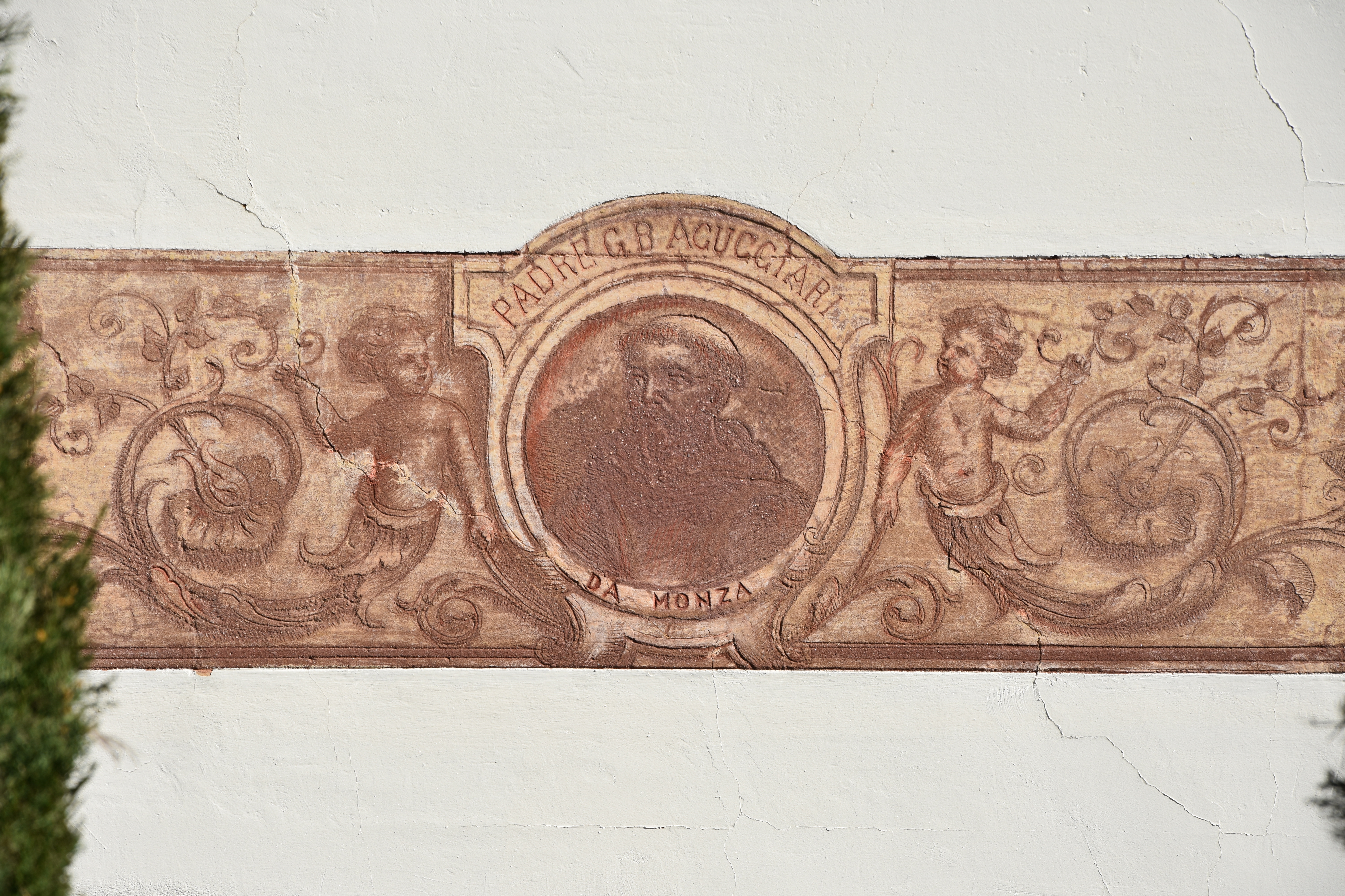 Al principio del percorso del Sacro Monte di Varese.